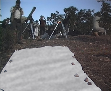 Fliegende Schatten bei der Totalen Sonnenfinsternis 21.06.2001